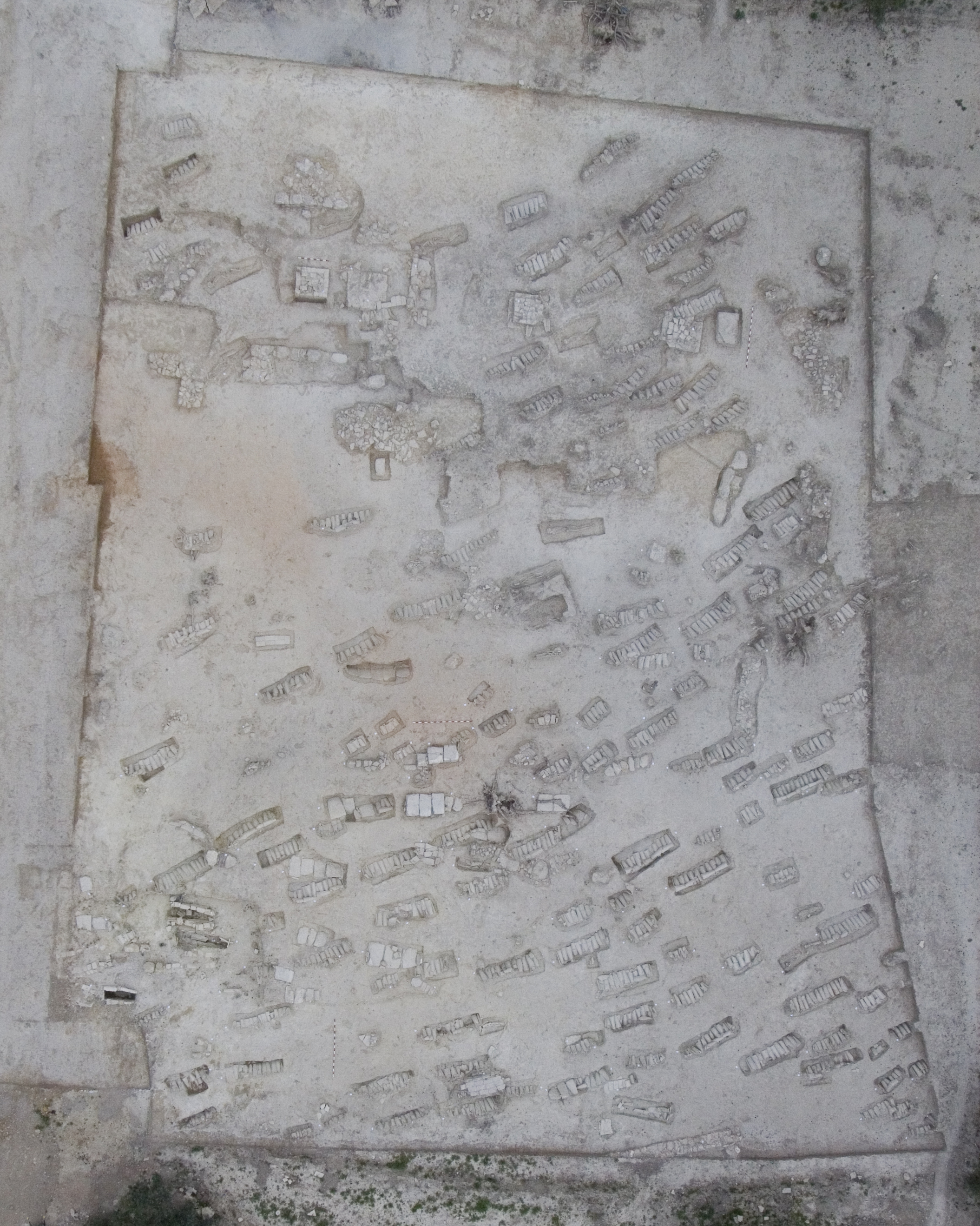 Vista aérea de la necrópolis de Fuente Álamo durante su excavación.